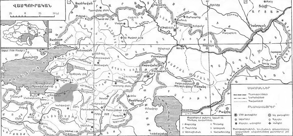 Վասպուրական